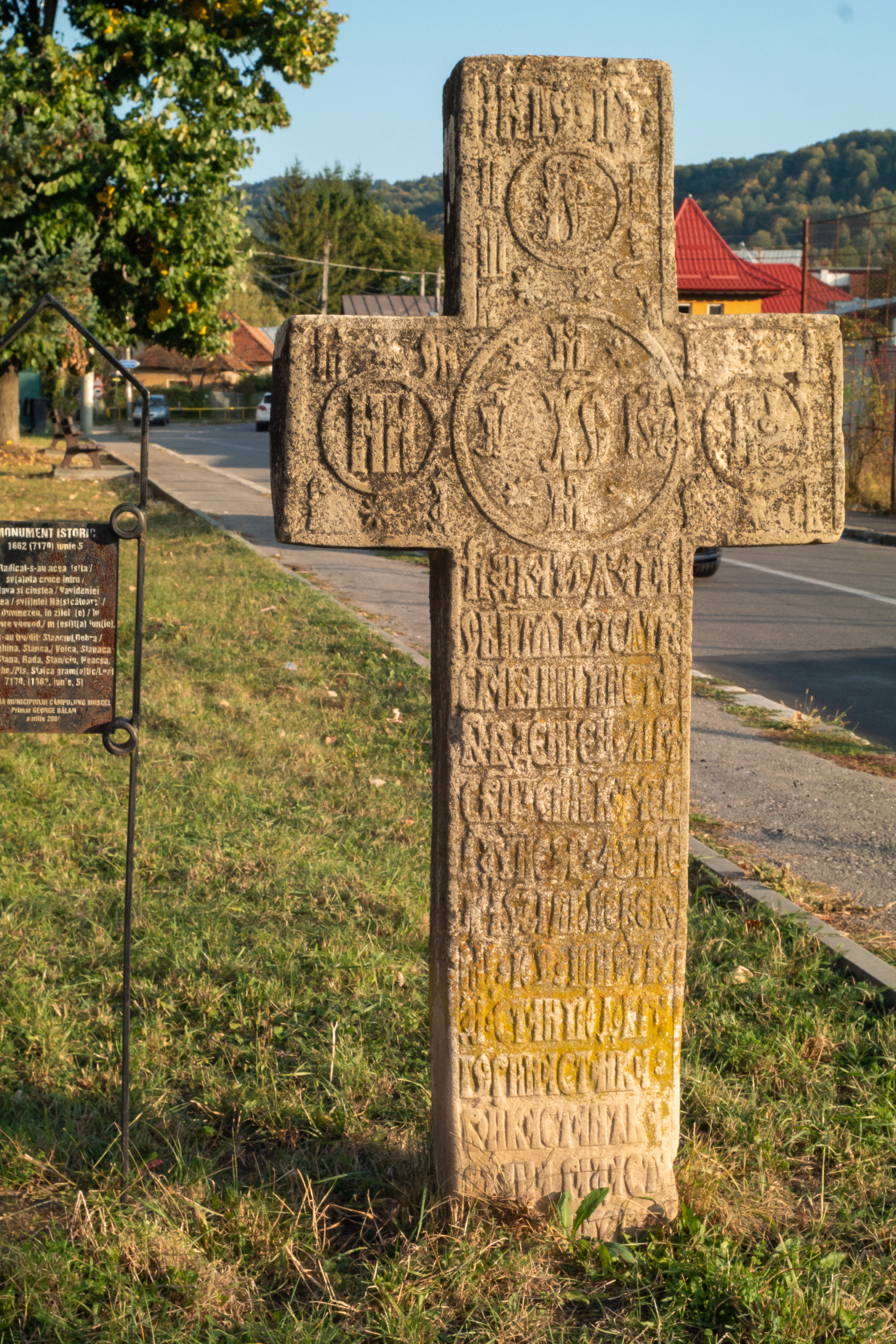 Cruce de piatră. 1662, iunie 5. radicat-s-au aceasta svanta cruce întru slava si cinstea / Vavideniei / a prea / svintei Nascatoarei /lu Dumnezeu, in zilele / lu Grigore voevod, / mesita iunie,Si s-au trudit - Stanciul, Dobra,/Gherghina, Stanca,/Voica, Stanaca,Stana,Rada,Stanciu, Neacsa,Gheorghe,/Pis.Stoica gramatic,/Leat 7170,(1882,iunie,5)1662, iunie 5.